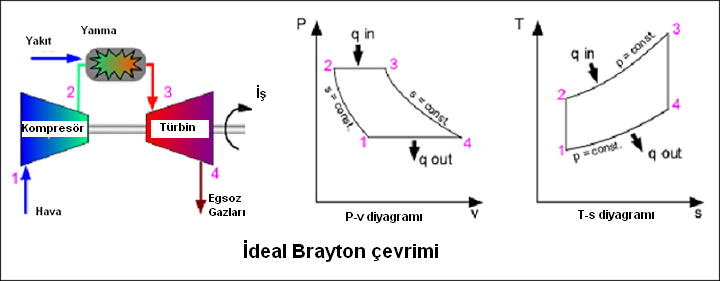 Kaynak: wikipedia